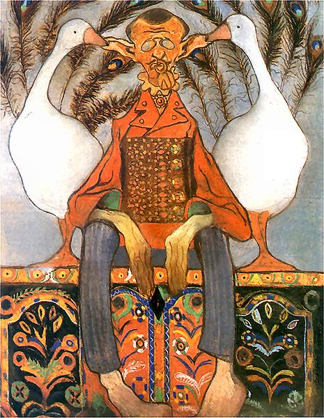 Karykatura Lucjana Rydla 1904 Muzeum Literatury im. Adama Mickiewicza, Warszawa.